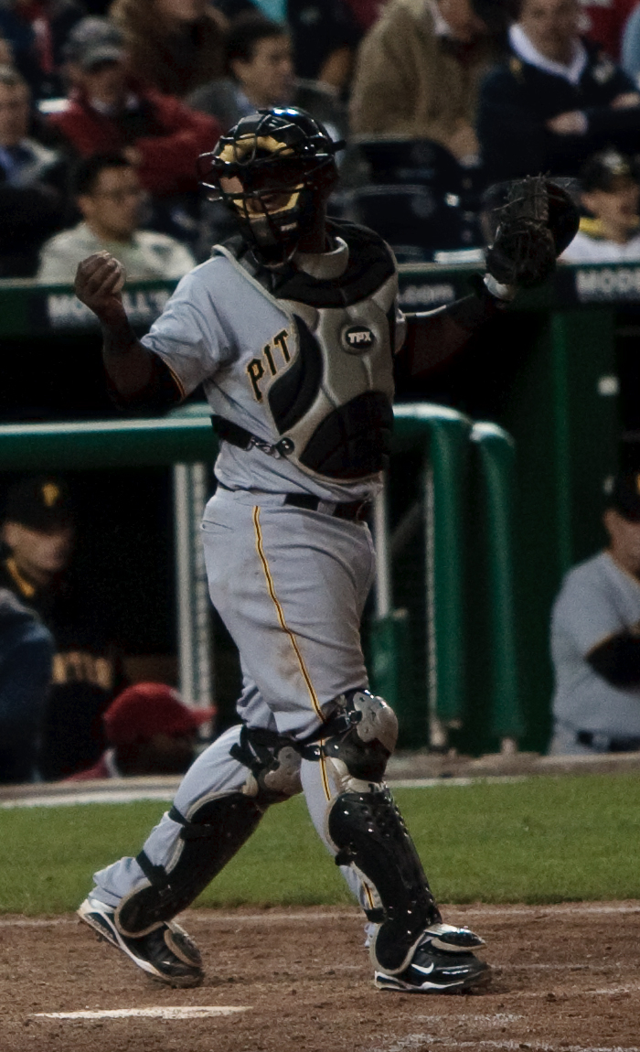 Robinzon Díaz